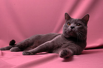 Vladimir du Parc Royal, Chat Chartreux mâle, appartenant à Elise de Guerny